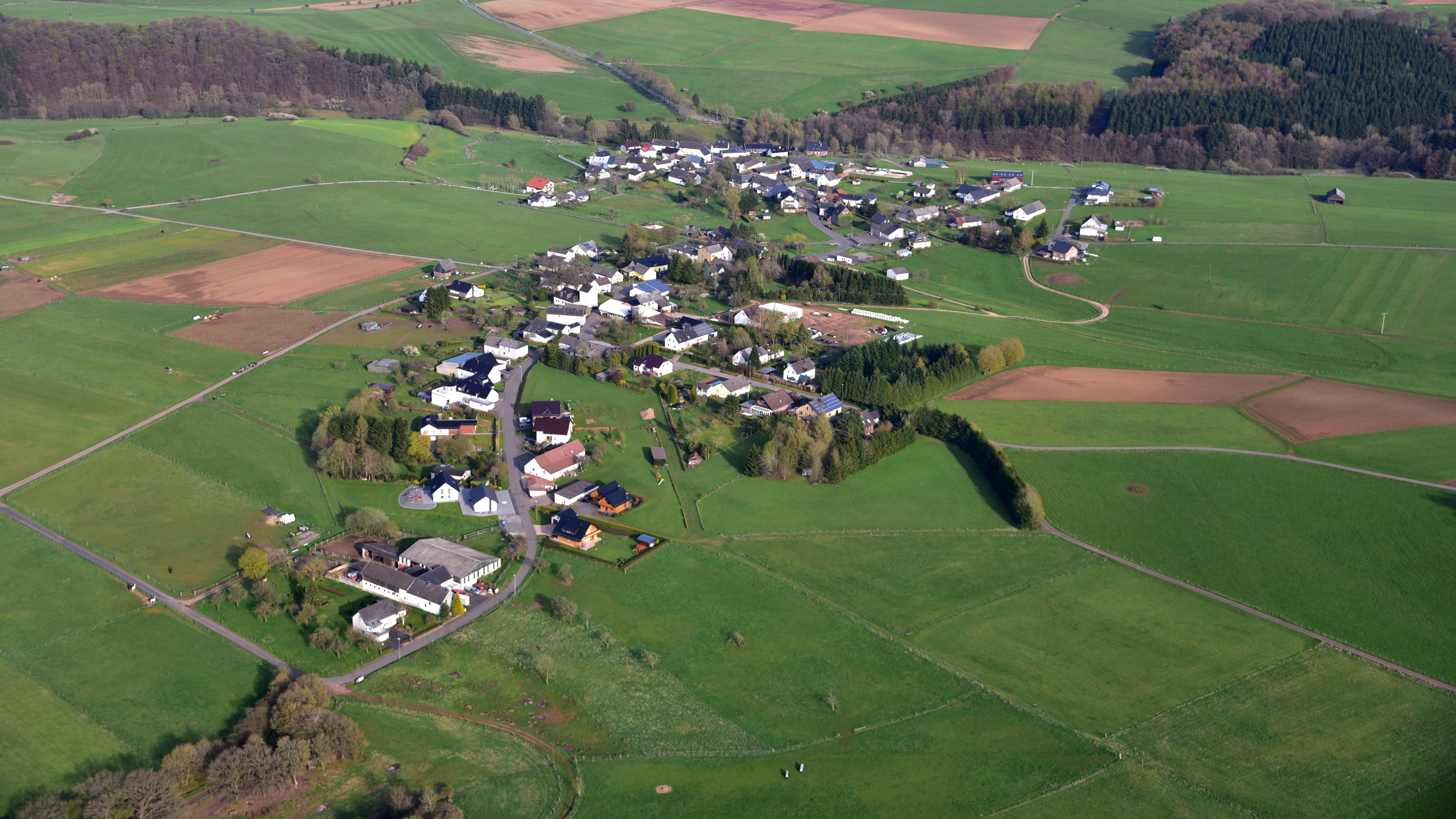 Waldorf (Blankenheim), Luftaufnahme (2016)